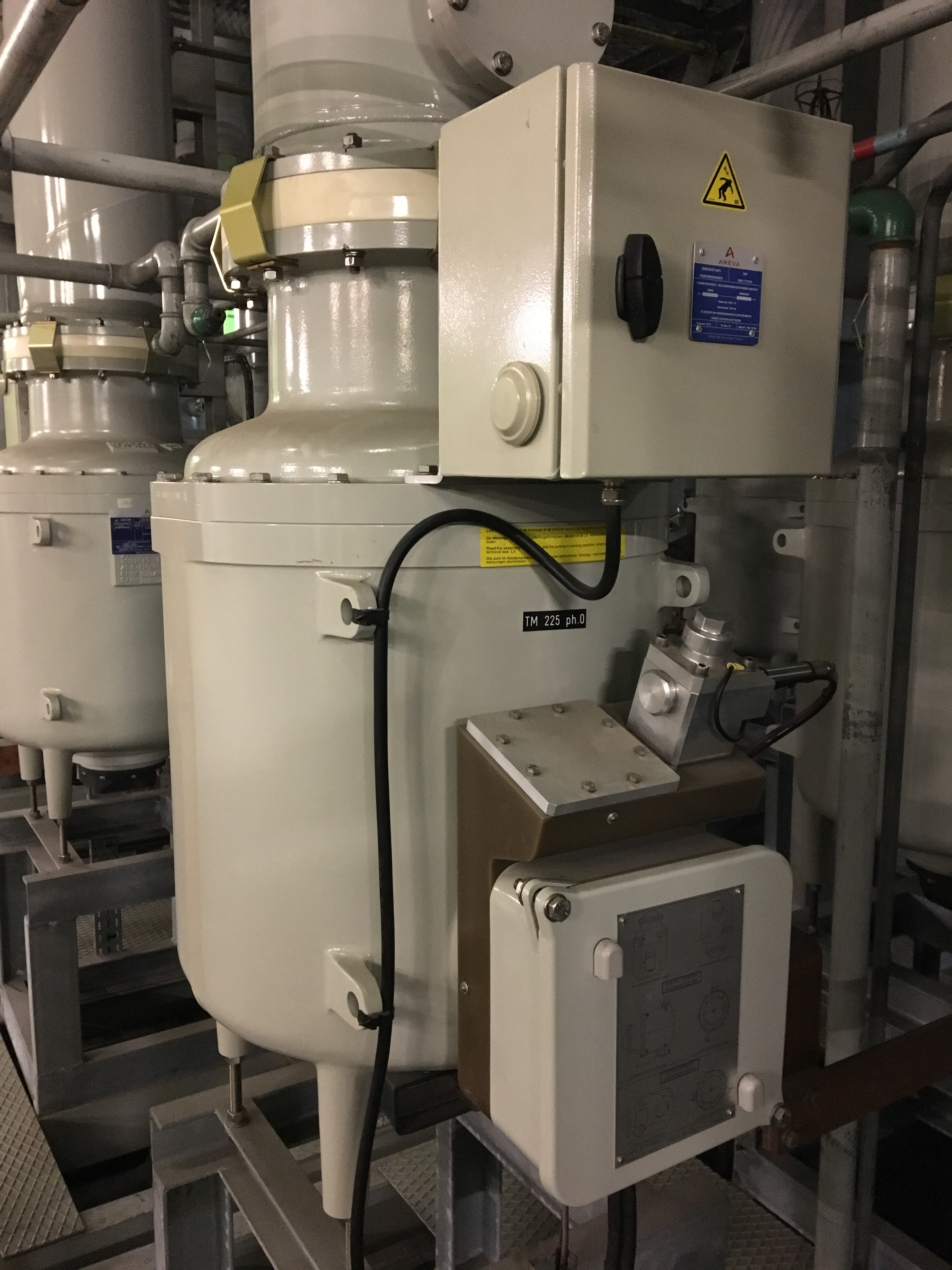 transformateur pour mesurer la haute tension 225 kV/100 V